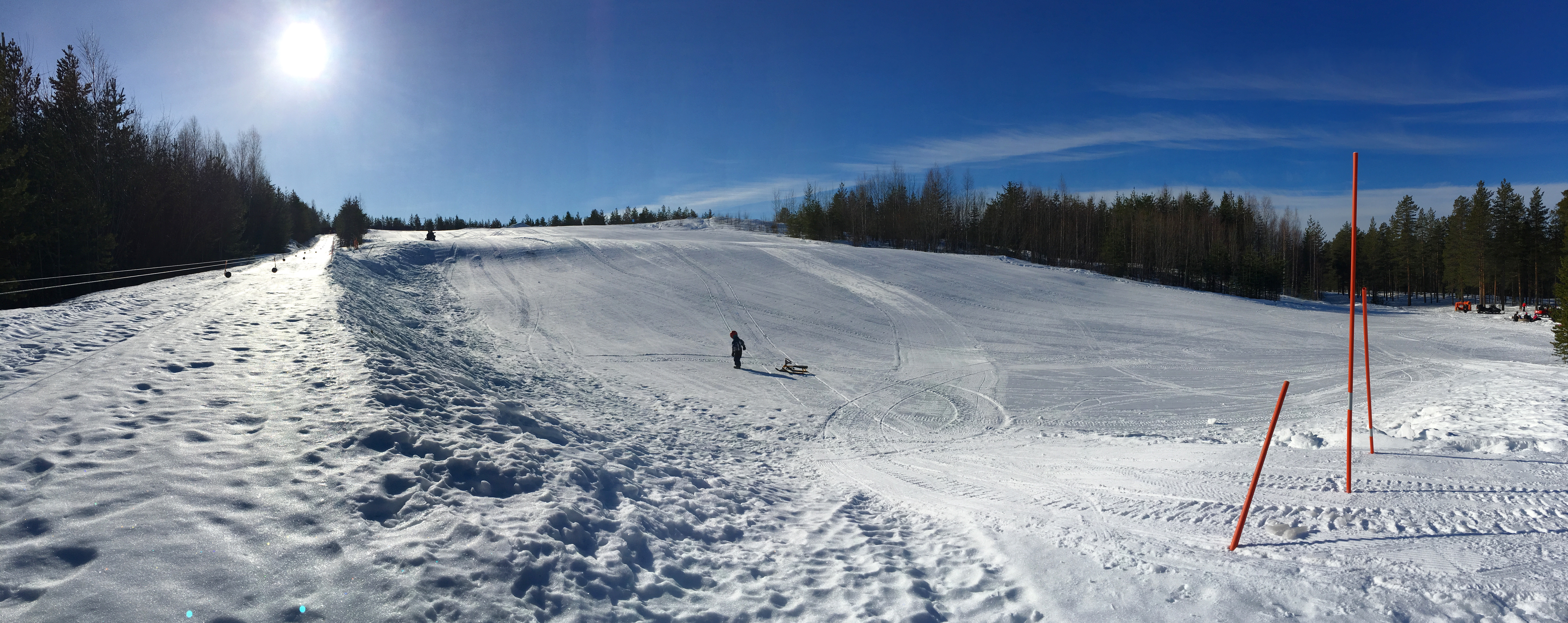 Gruvberget är ett friluftsområde i Boden. Vintertid finns en pulkbacke och möjlighet till längdskidåkning i ett 2,5 km långt elljusspår. Berget har utsikt över Bodens tätort med omnejd.